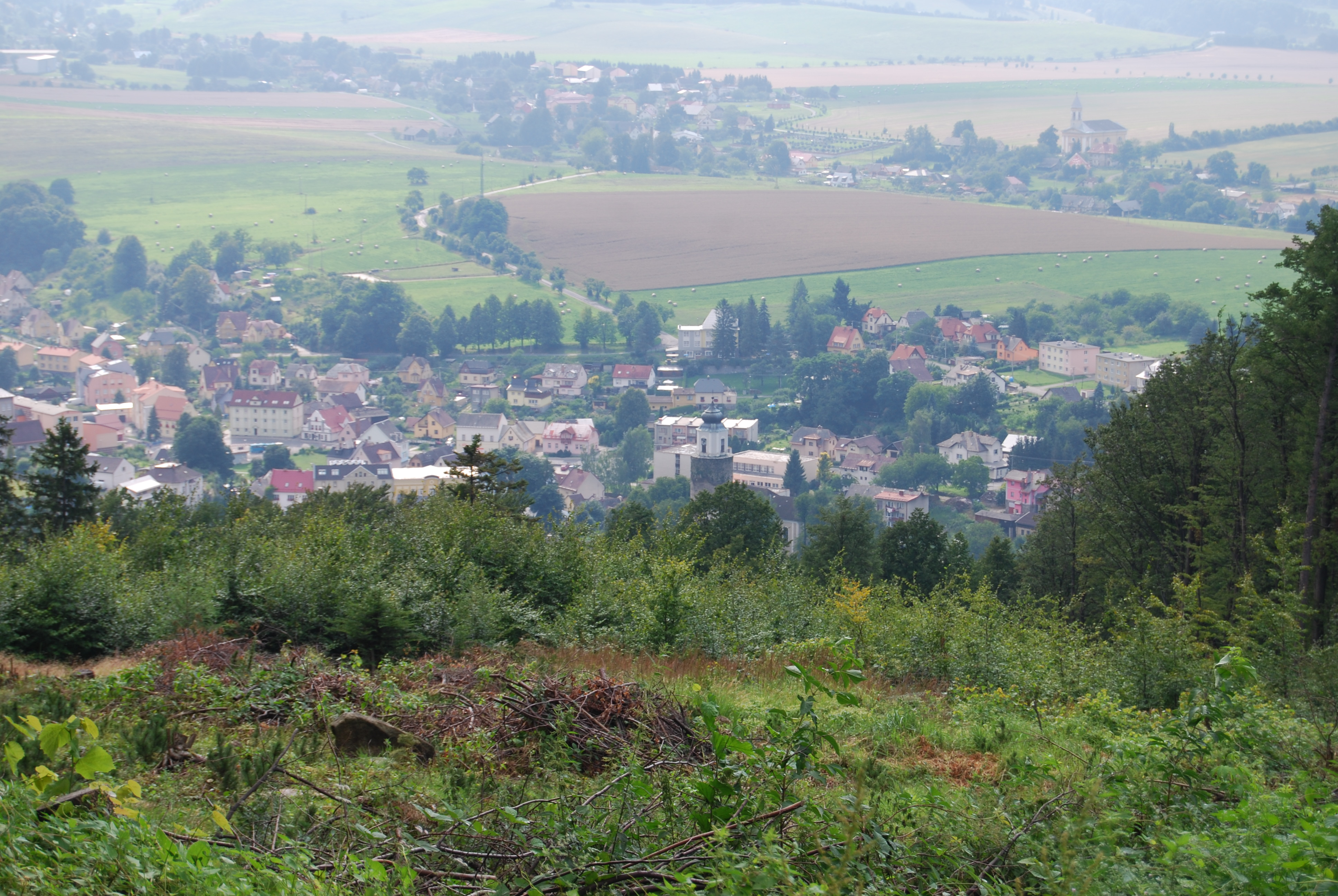 Pohled na Žulovou z hory. Poutní místo - kostel Panny Marie Bolestné. Boží hora (německy Gotthausberg) vrchol v Žulovské pahorkatině u obce Žulová. Okres Jeseník. Česká republika.